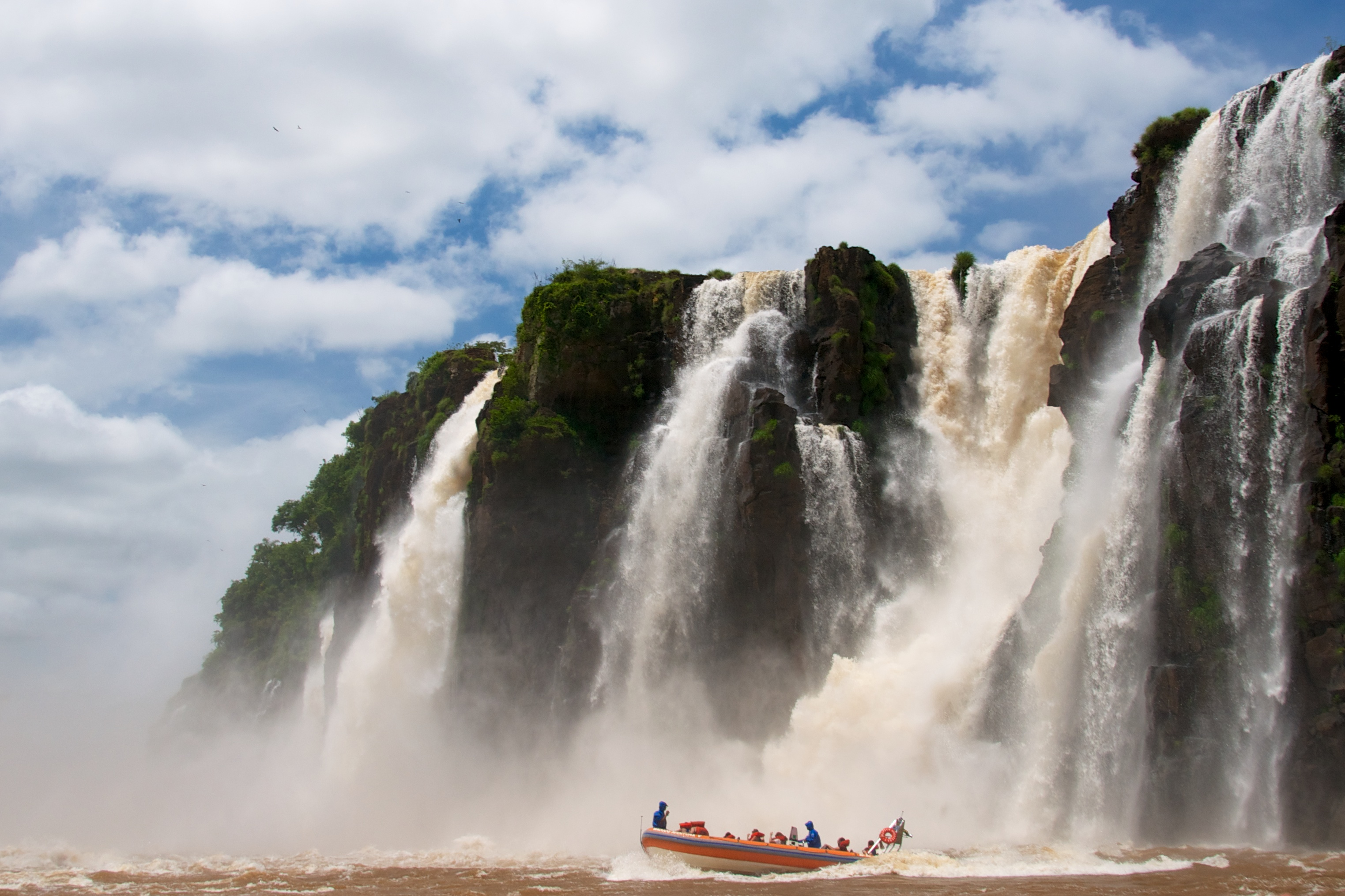 Iguazu Falls